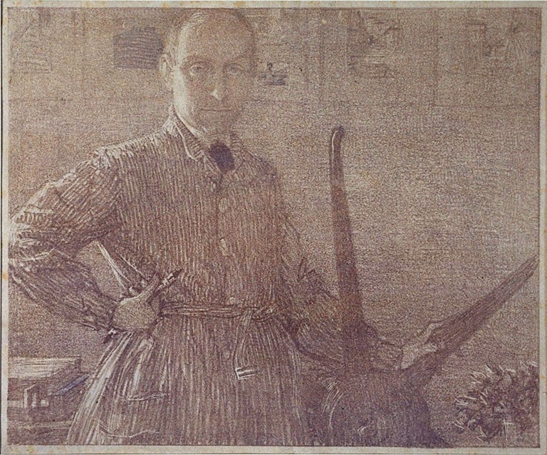 Autoritratto, litografia, 27.7 x 22.9 cm, Museo Ugonia, Brisighella